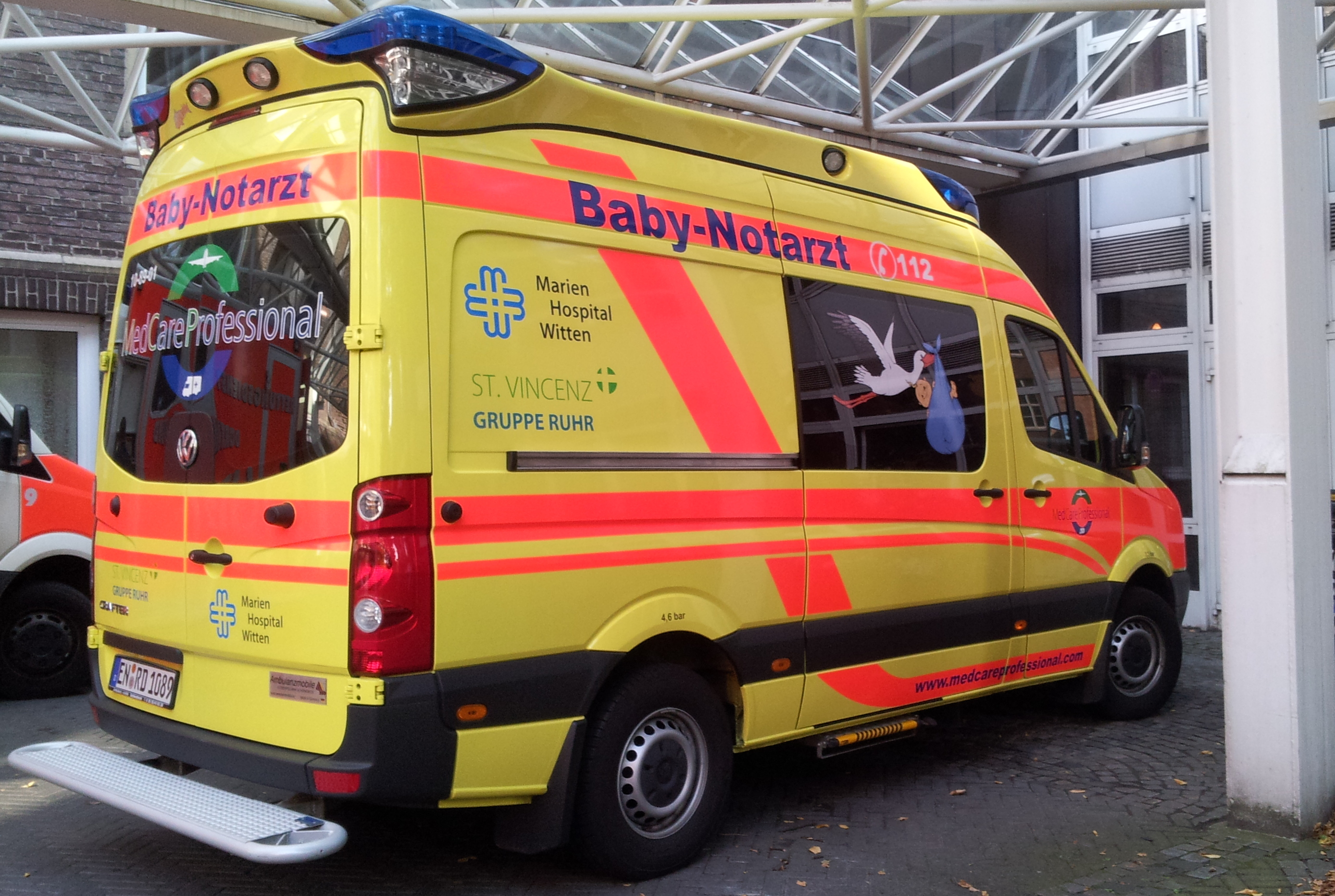 Baby-Notarztwagen Witten